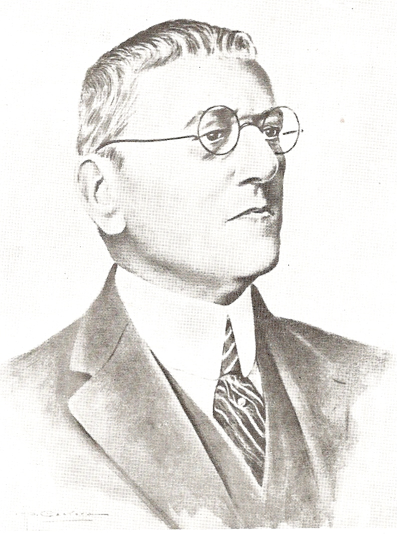 Luis Razetti (1862-1932) óleo/tela de Emilio J. Mauri, reproducción: El Cojo Ilustrado